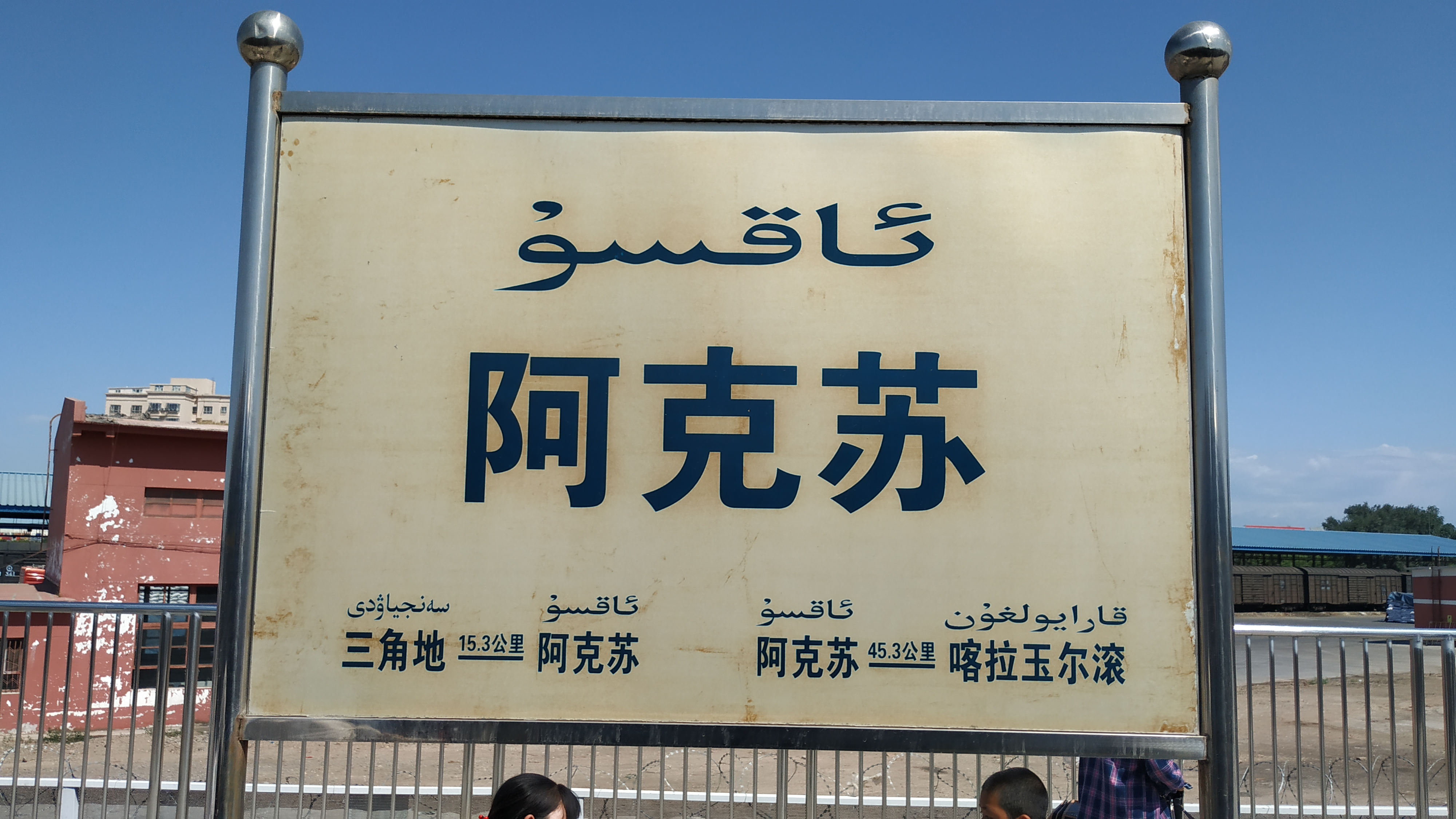 中文（中国大陆）: 阿克苏站站牌